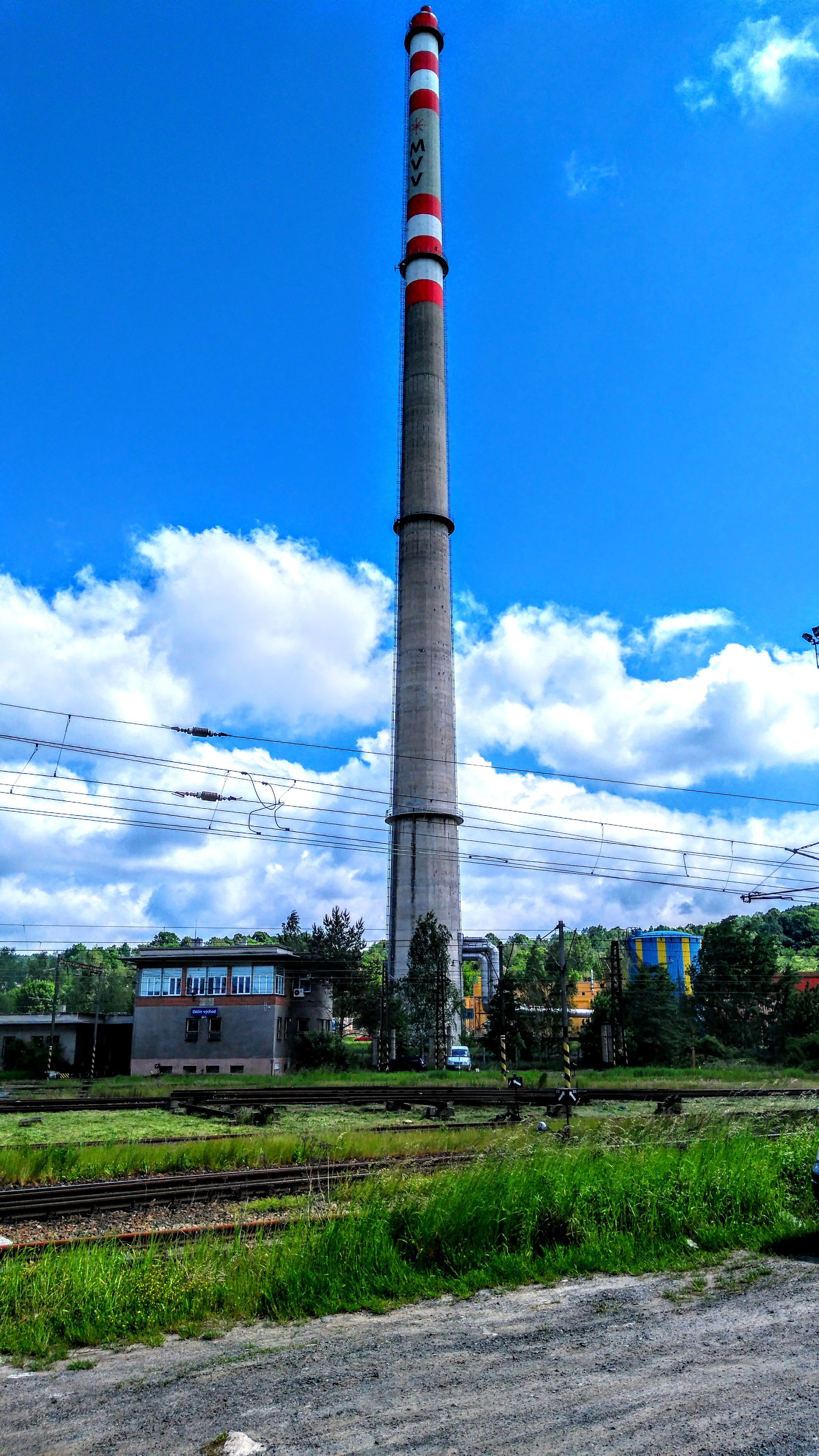 Komín.